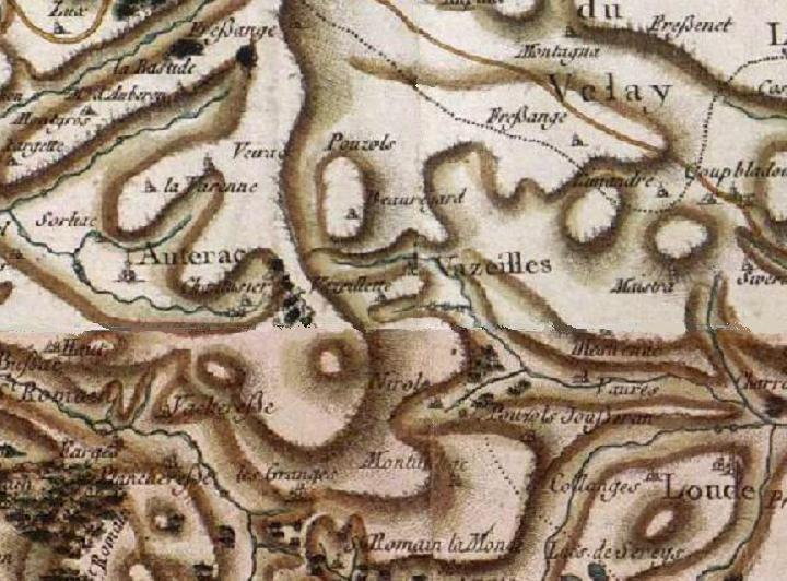 vue du village de Vazeilles-Limandre (à l'époque Vazeilles) sur la carte Cassini